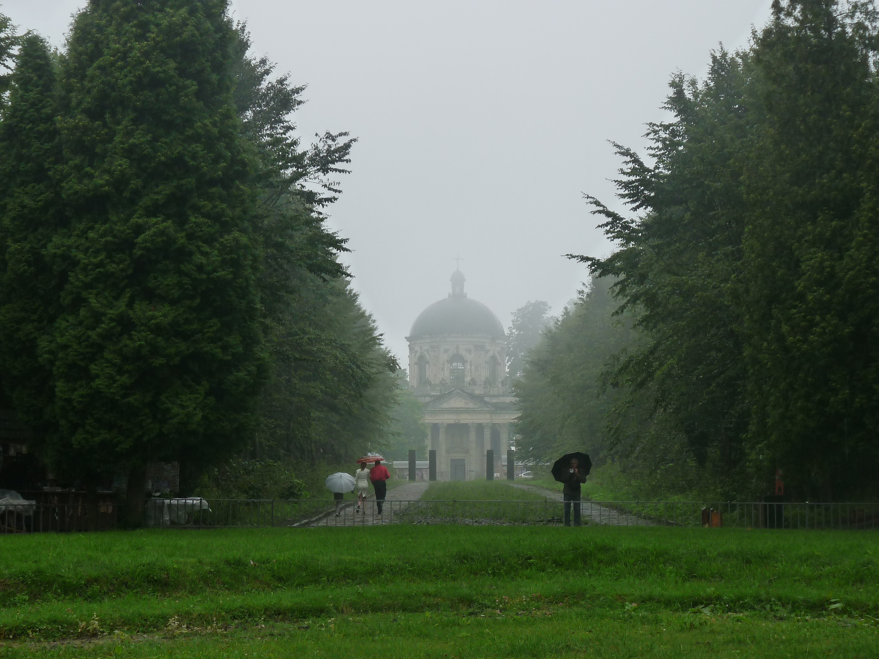 Замок Конецпольських (мур.) (комплекс), Підгірці